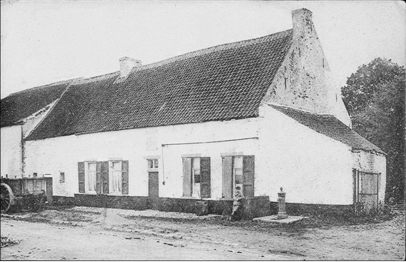 L'auberge de la Belle-Alliance vers 1880